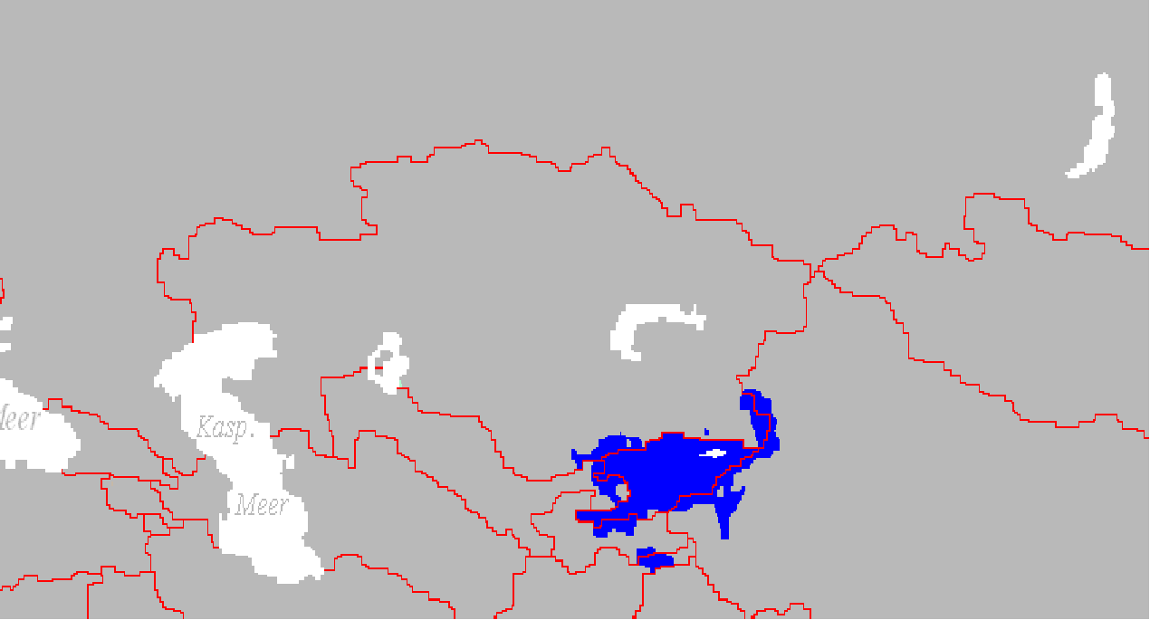 Verbreitungsgebiet der heutigen kirgisischen Sprache. / Darstellungskarte mit dem heutigen Verbreitungsgebiet der kirgisischen Standardsprache.